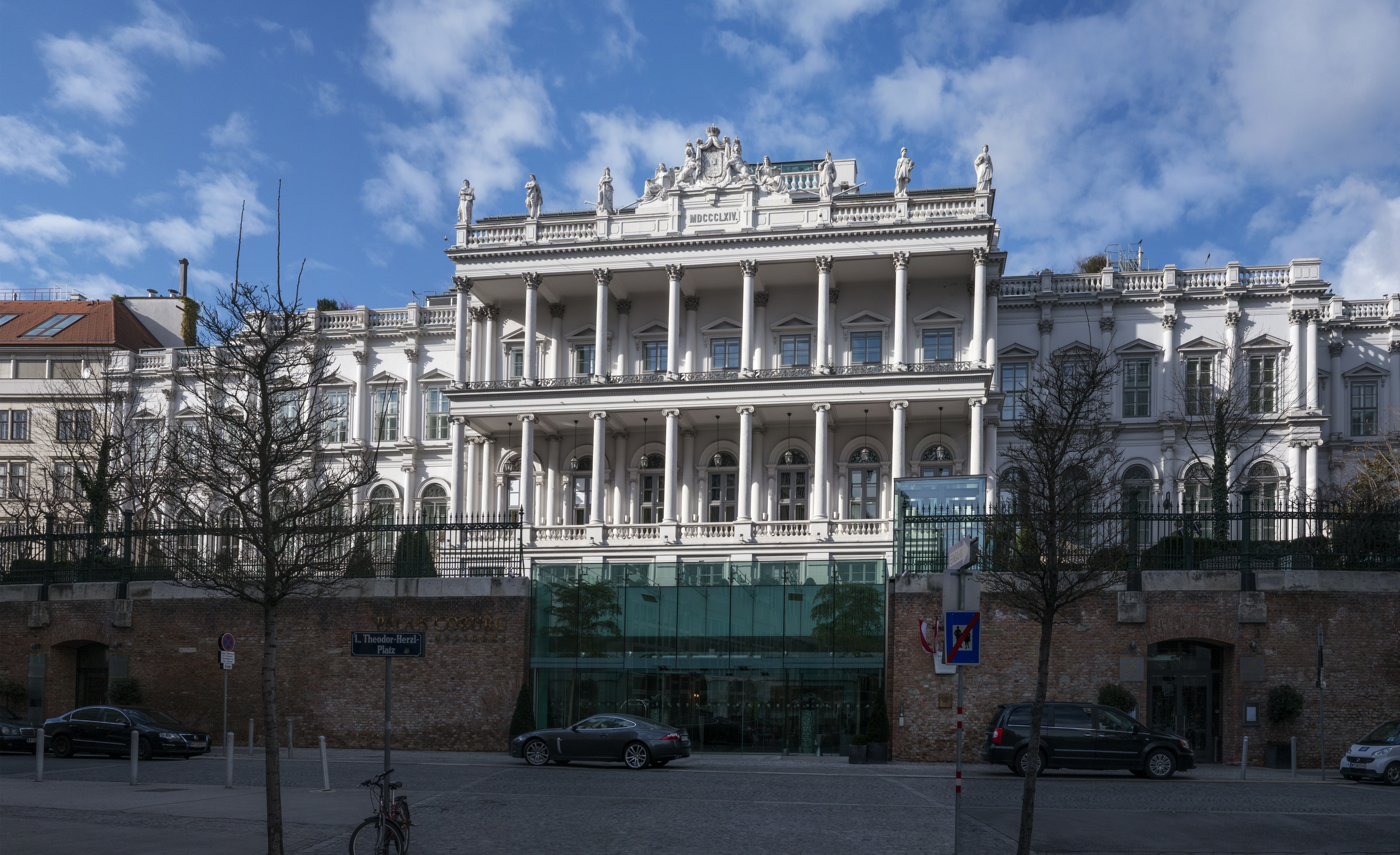 Palais Coburg